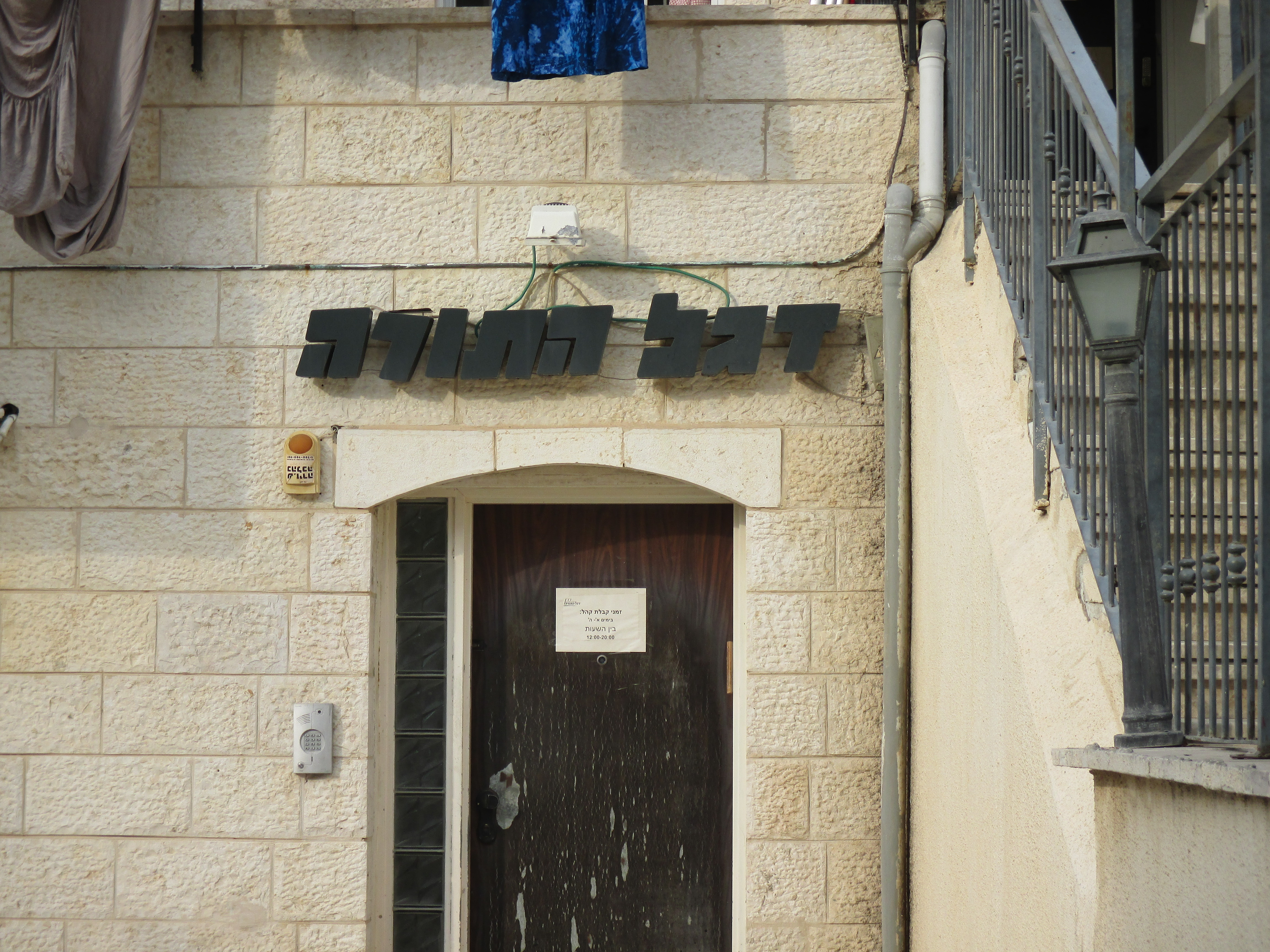 משרדי דגל התורה בשכונת זיכרון משה בירושלים